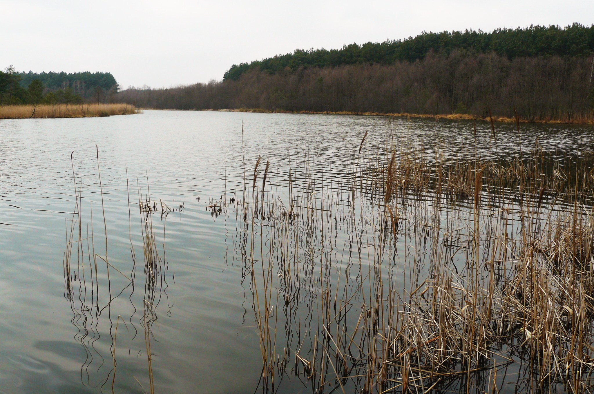 Główki koło Miałów.